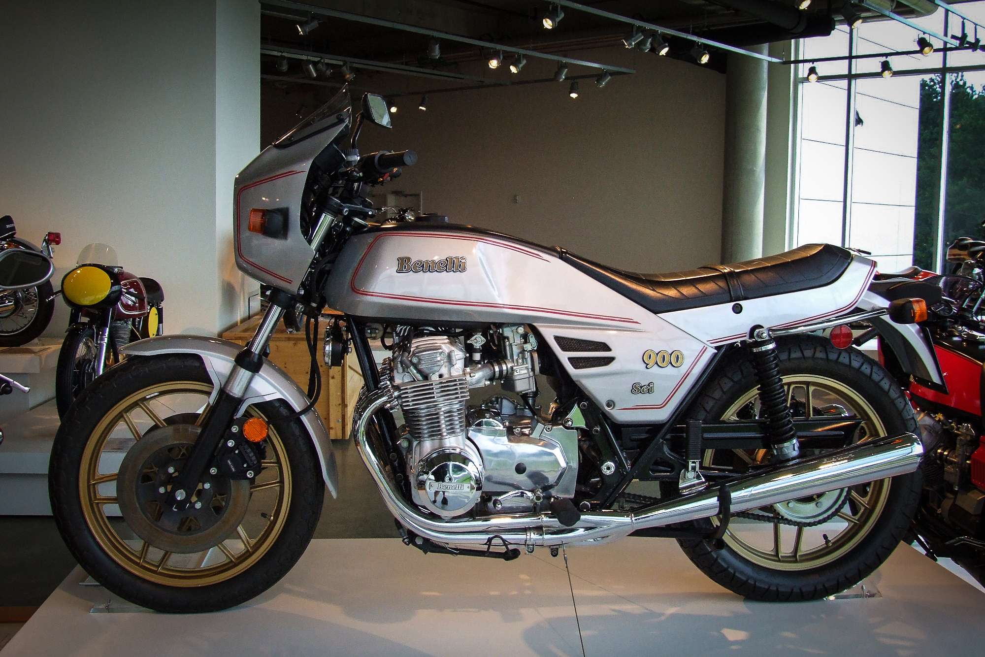 Benelli 900 Sei (1983) im Barber Vintage Motorsports Museum, Birmingham Alabama USA